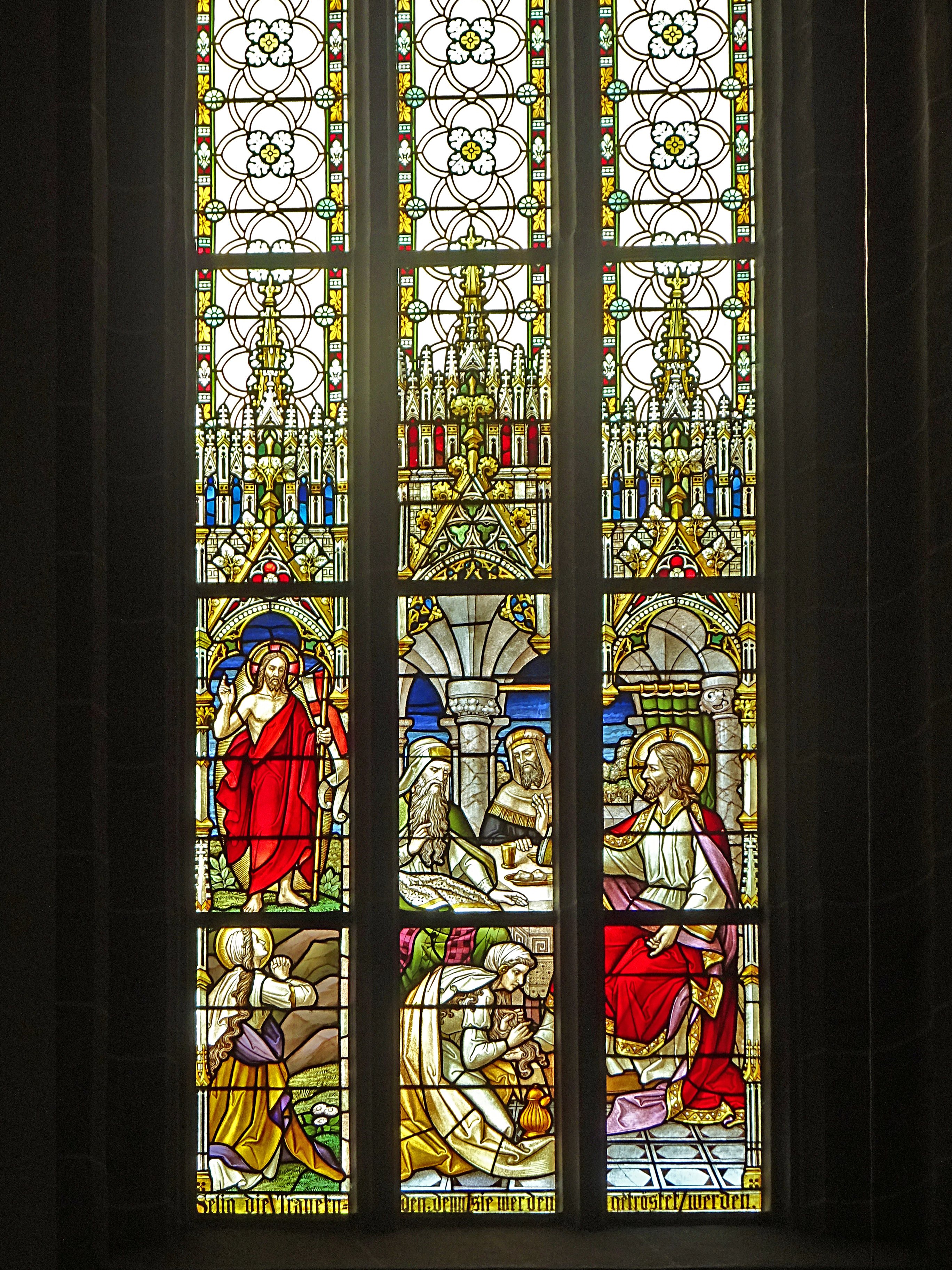 Buntglasfenster in der Pfarrkirche St. Gertrud (Dingelstädt) 3. Selig die Trauernden, denn sie werden getröstet werden / Die Liebe der Maria Magdalena